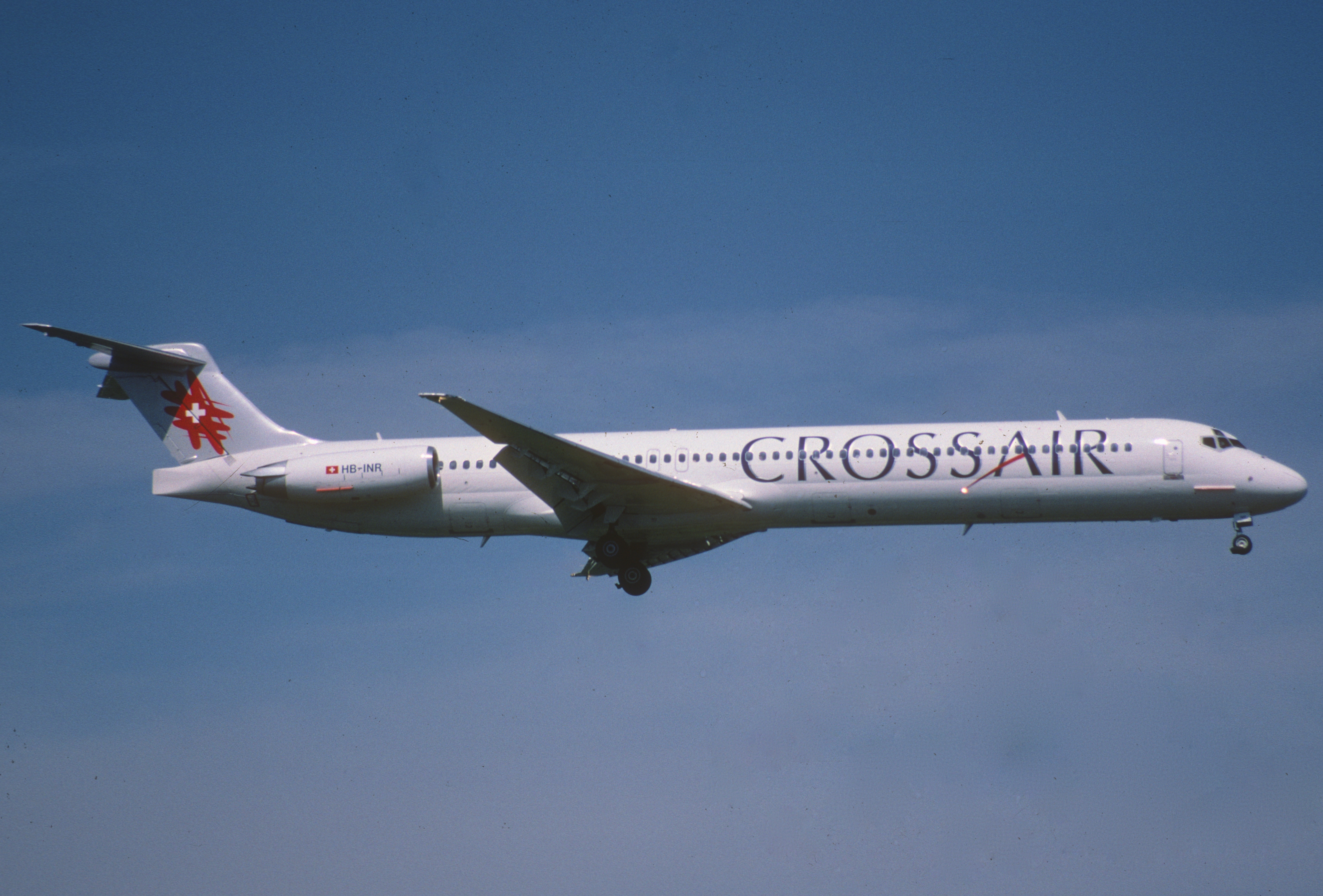 94am - Crossair MD-82; HB-INR@ZRH;16.05.2000